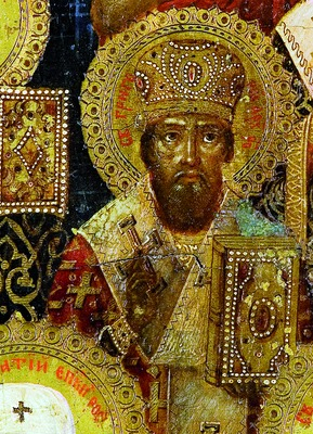 Свт. Григорий еп. Ростовский. Фрагмент иконы «собор Ростовских святых». Кон. XIX - нач. XX в. (ц. Толгской иконы Божией Матери, Ростов)